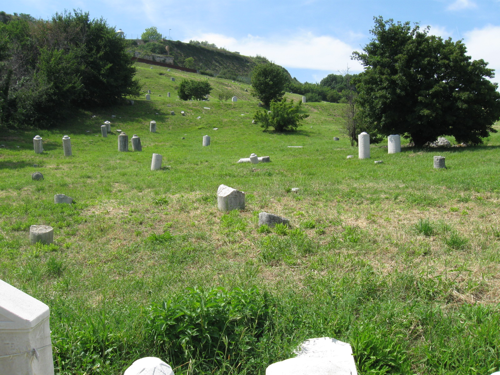 מראה כללי של בית הקברות היהודי רישיון נוצר על ידי משתמש:Daniel Ventura